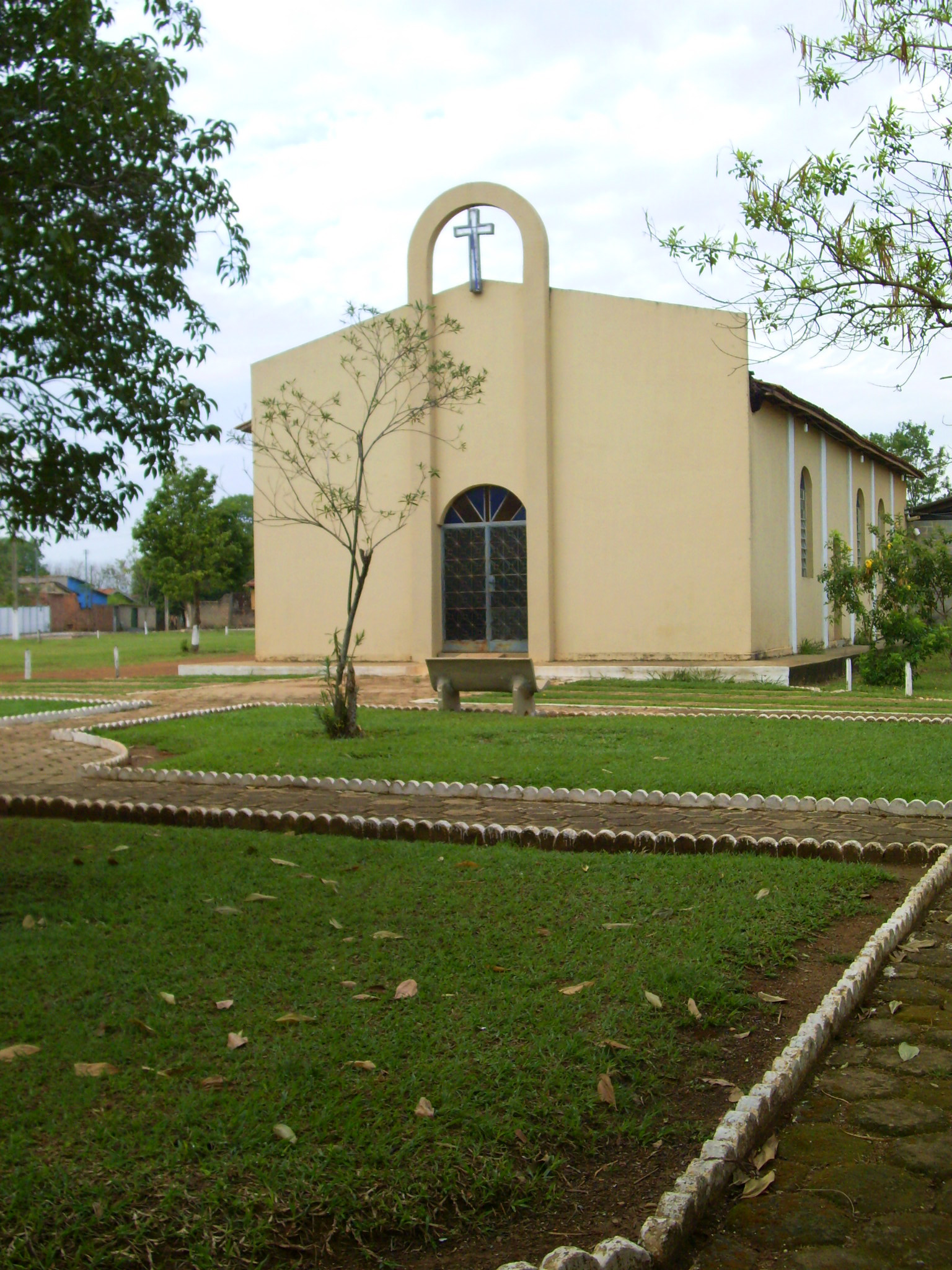 Campestre de Goiás - State of Goiás, Brazil